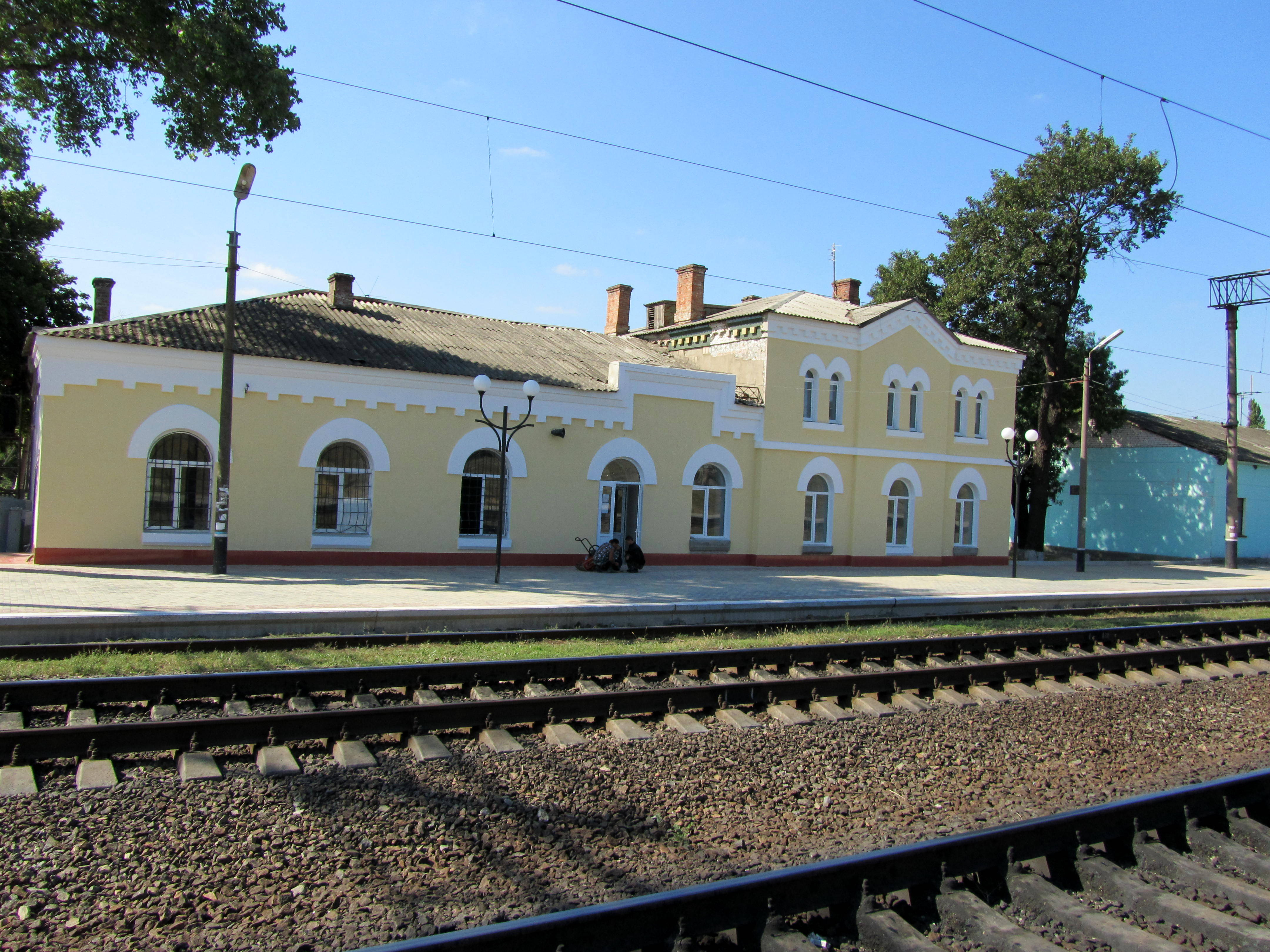 Вокзал в пгт Веселиново, Украина. Дорога из Одессы в Москву, Киев и др. Сентябрь 2010 г., камера Canon.